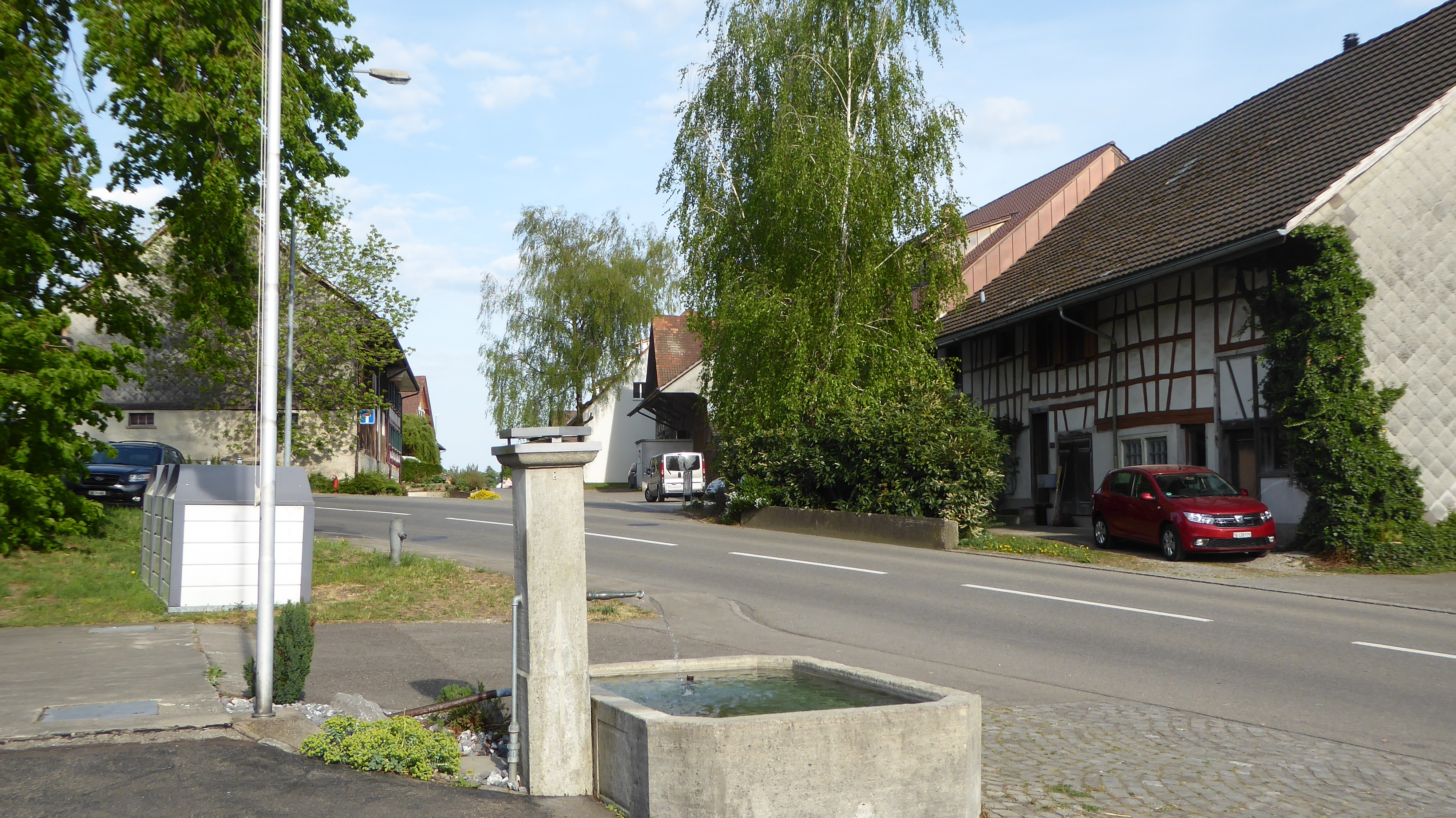 Engwilen TG